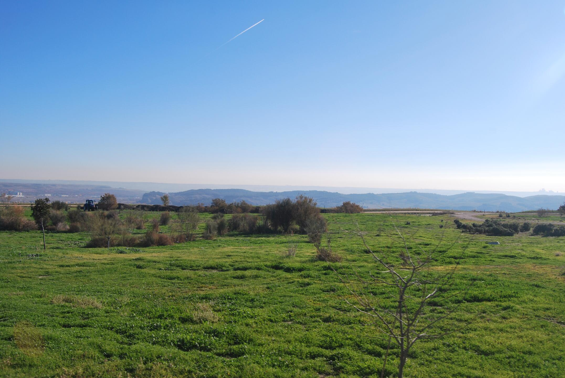 Outra vista do antigo vertedoiro restaurado